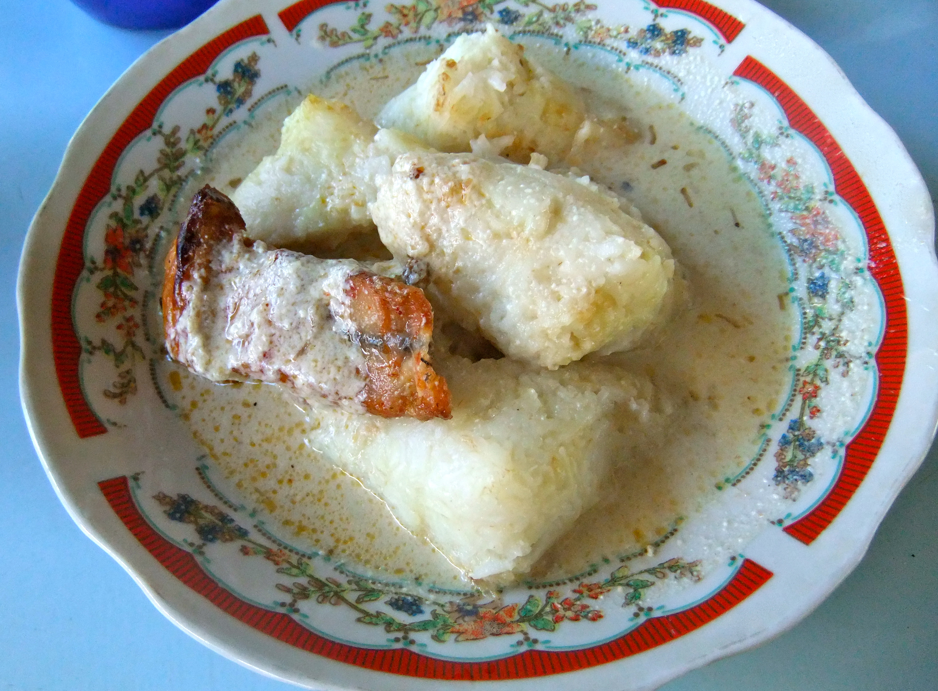 Ketupat Kandangan di Kandangan